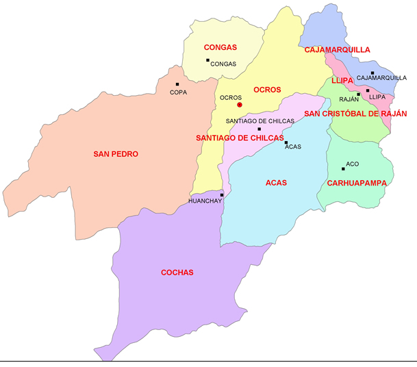 Dsitritos de la Provincia de Ocros